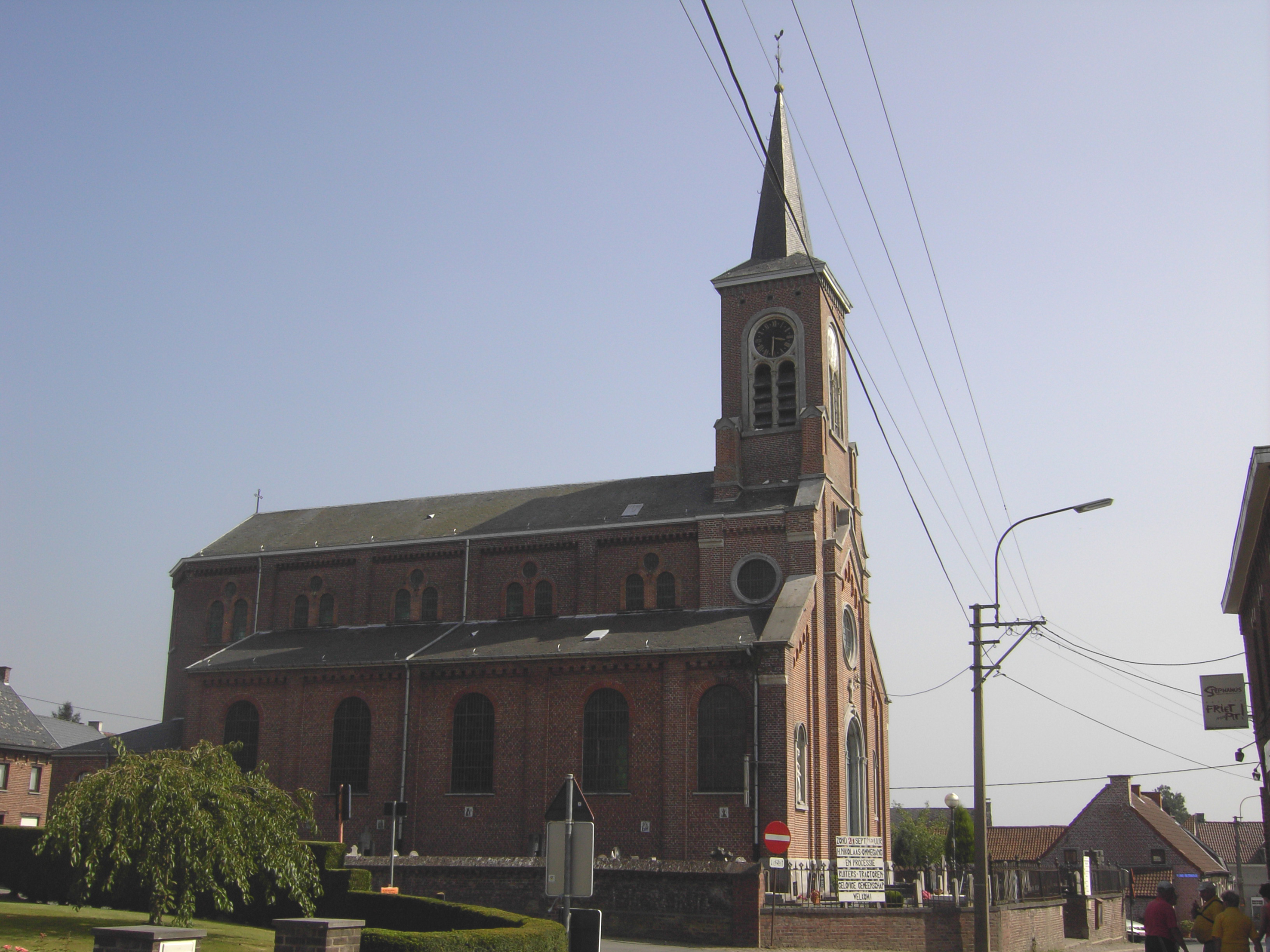 Sint-Stefanus Vindingkerk - Zonnegem - Sint-Lievens-Houtem - Oost-Vlaanderen - België